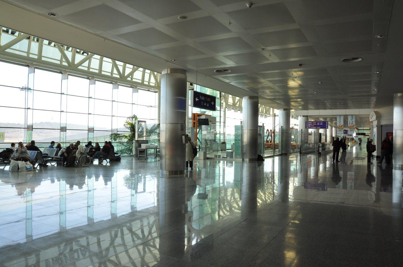 Adnan Menderes Havalimanı iç görünümü